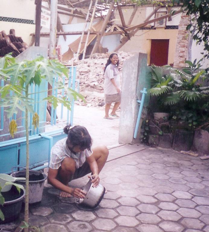 zelf gemaakt, PD Bessel Dekker 20 jun 2006 20:48 (CEST)